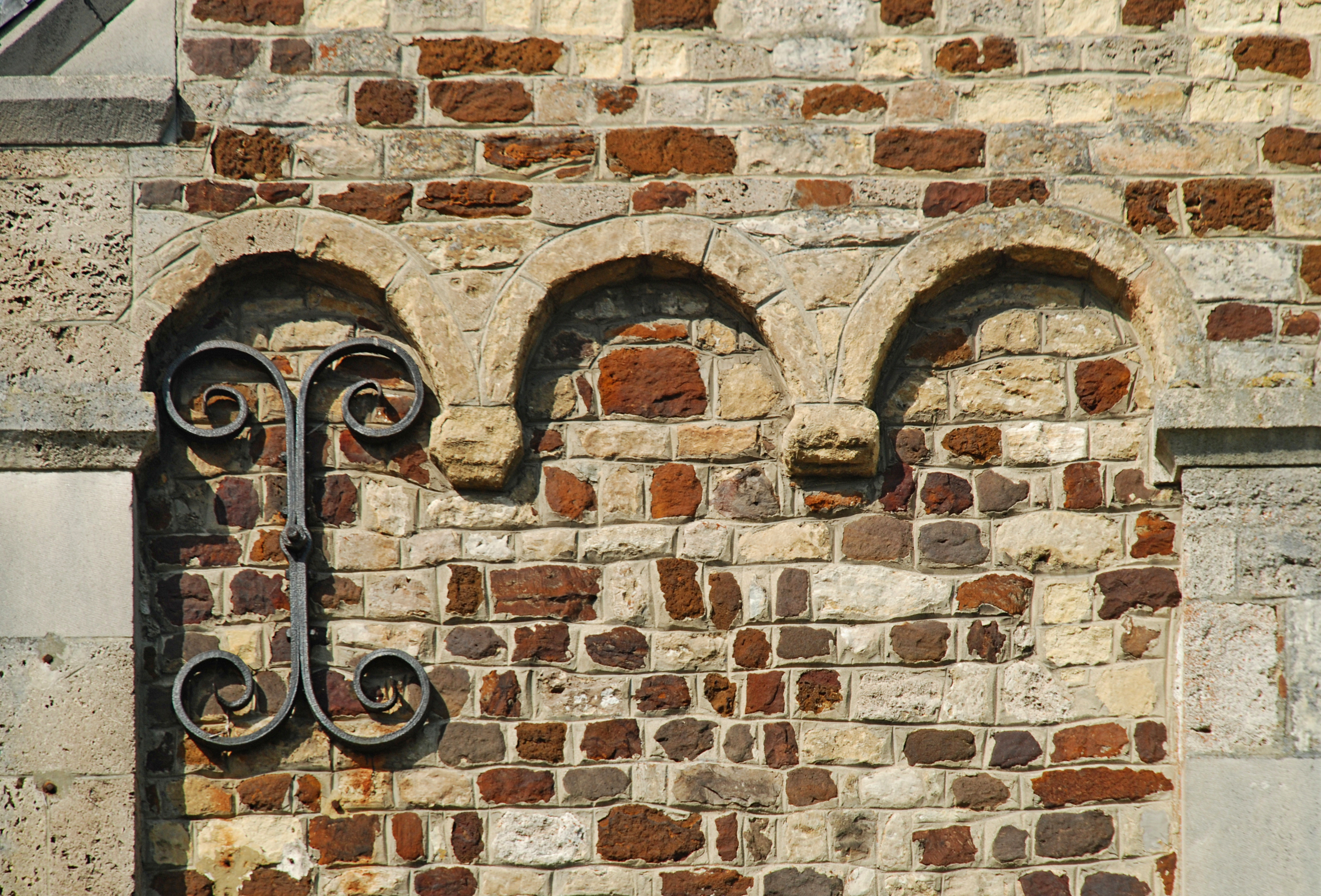 Belgique - Brabant flamand - Église Saint-Hilaire de Bierbeek